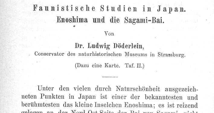 Titel